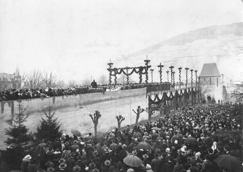 Einweihung der neuen Moselbrücke Cochem - Cond. am 23.01.1927. Durch den Oberpräsidenten der Rheinprovinz Herrn Dr. Fuchs, Coblenz [Koblenz].